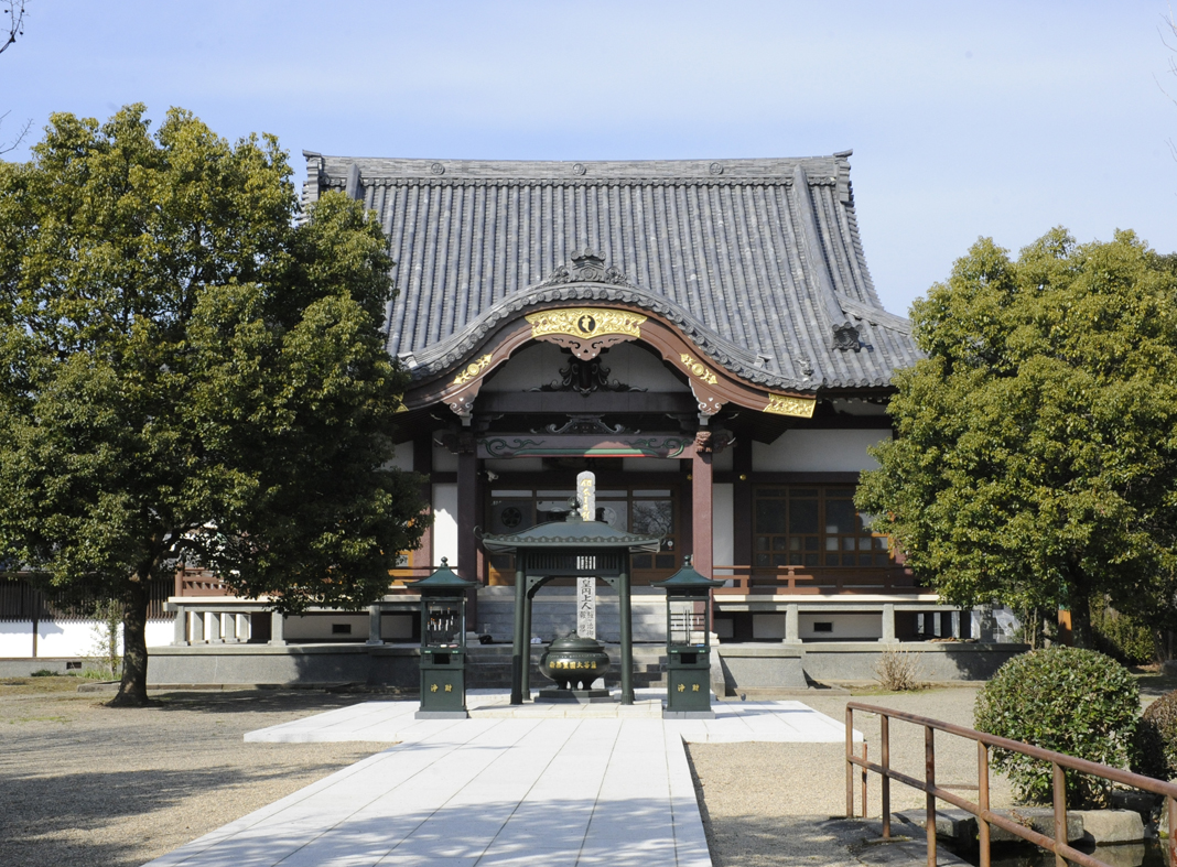 本堂と参道